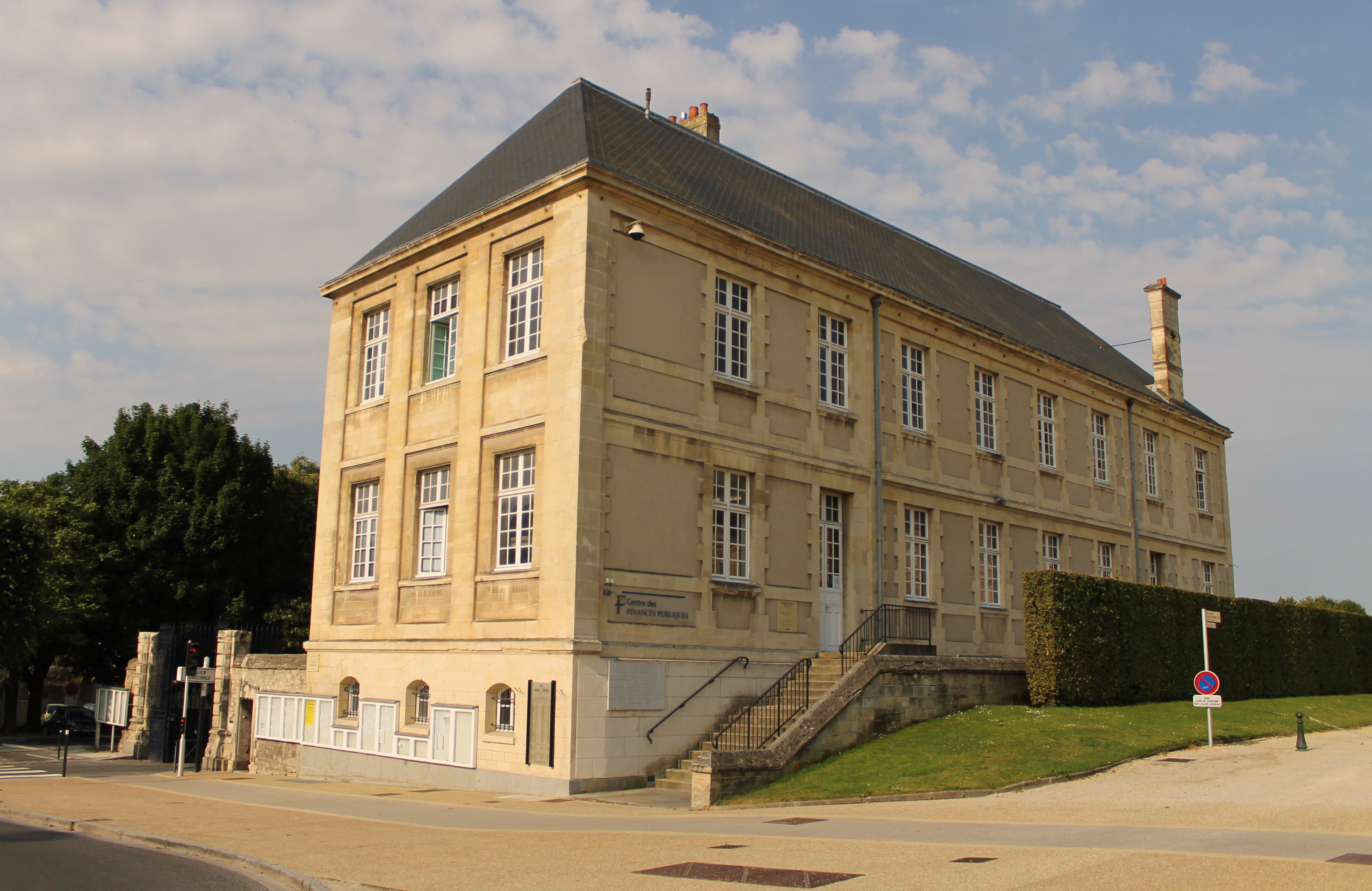 Bâtiment du petit lycée (XIXe siècle), aujourd'hui occupé par la Police Municipale, esplanade Jean-Marie Louvel à Caen (Calvados)